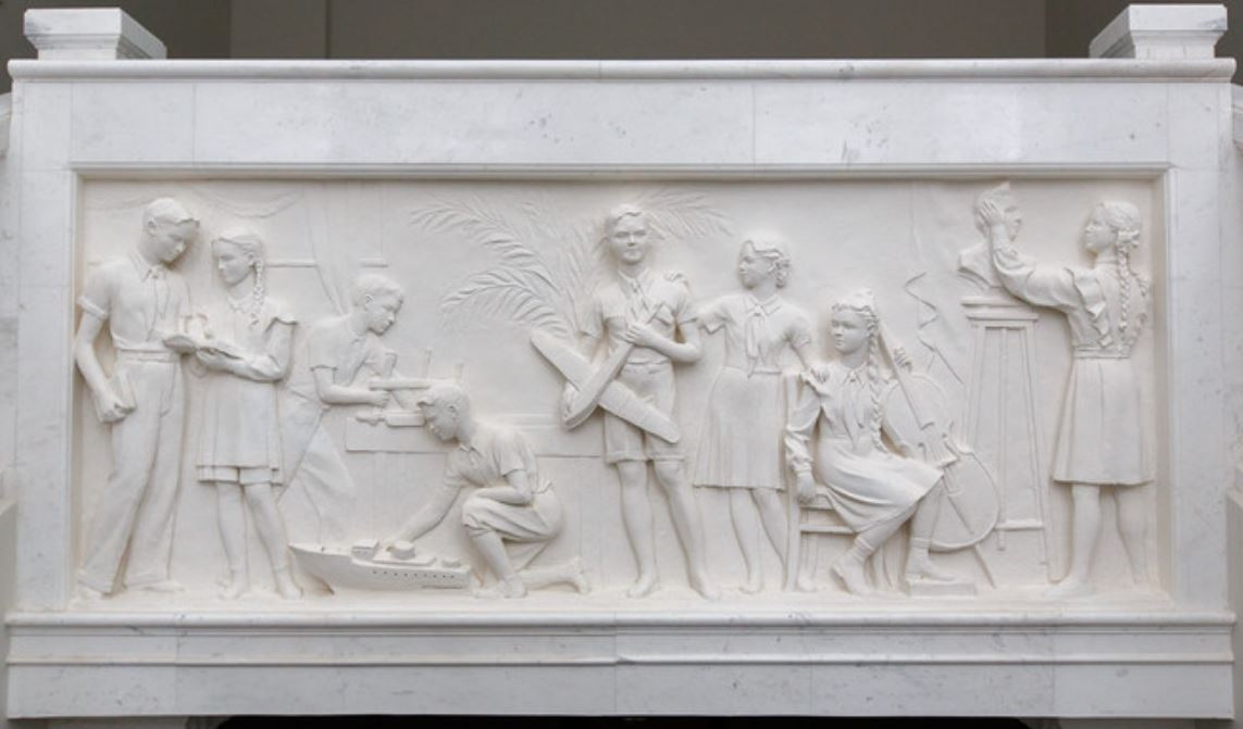 Глебаў. Рэльефы на на сюжэты піянерскага жыцця ў Палацы піянераў і школьнікаў. 1940